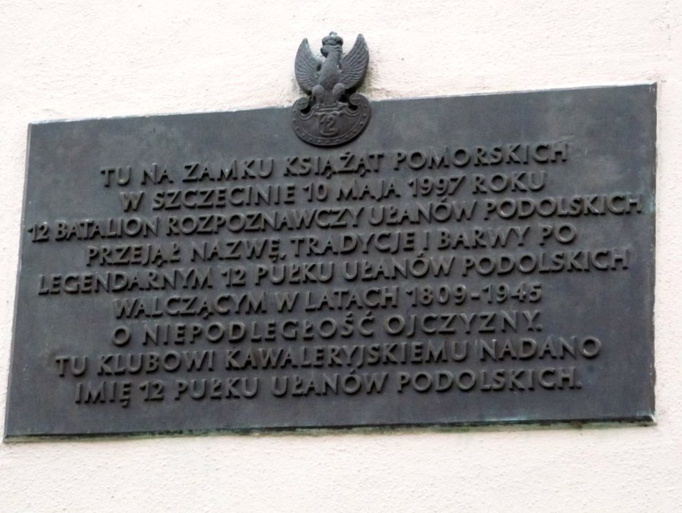 Tablica pamiątkowa na dziedzińcu Zamku Ksiażąt Pomorskich w Szczecinie